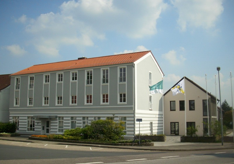 Slesvighus i Slesvig by